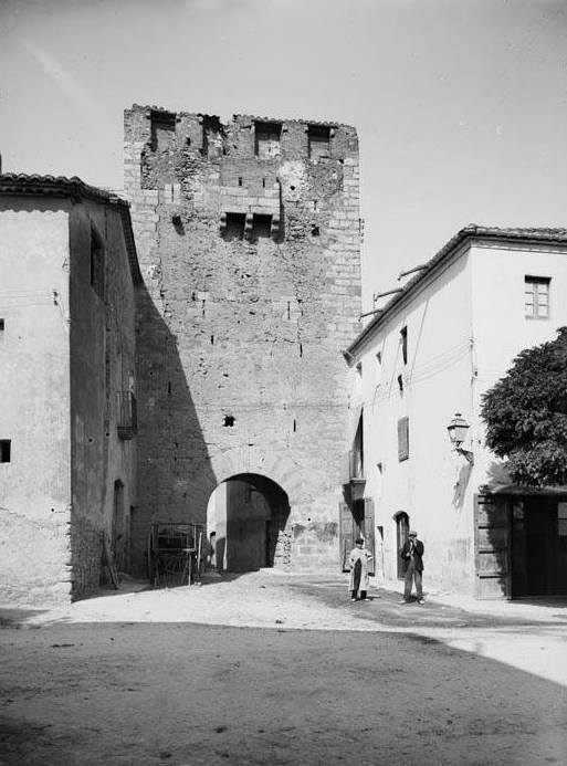 Imatge